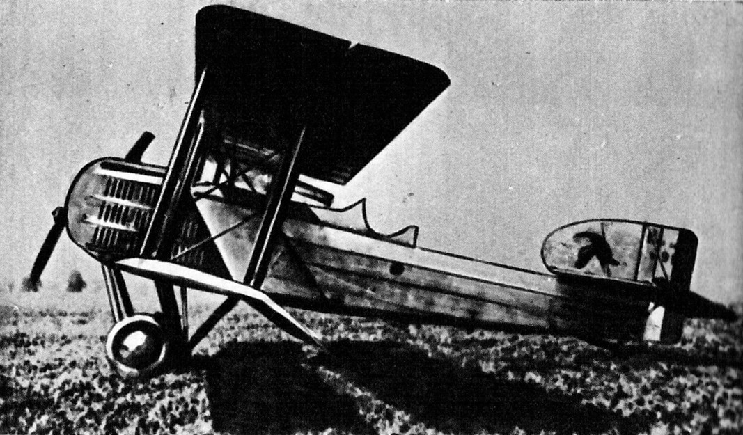 Francuski samolot rozpoznawczy Breguet 14A2.